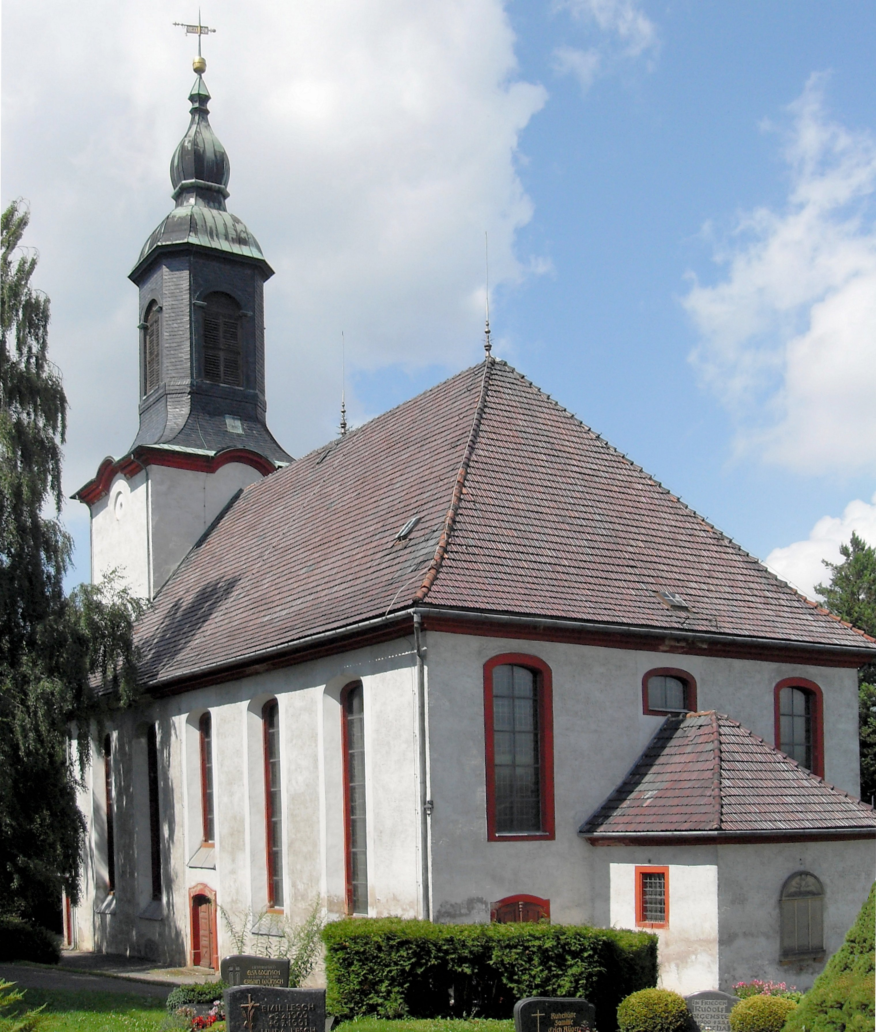 Süddostseite der evangelischen Kirche in Leubsdorf, Landkreis Mittelsachsen